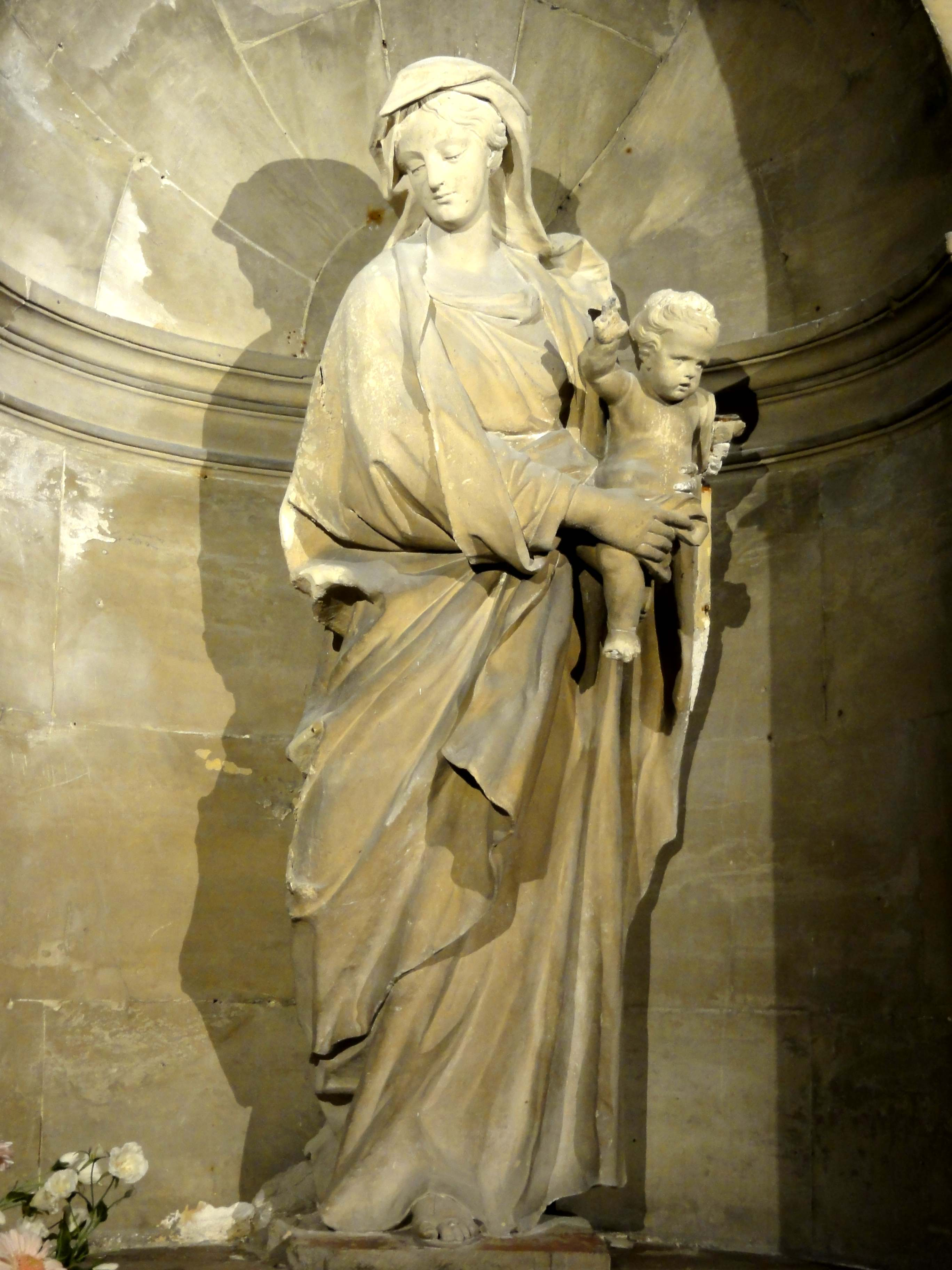 Vierge à l'Enfant.